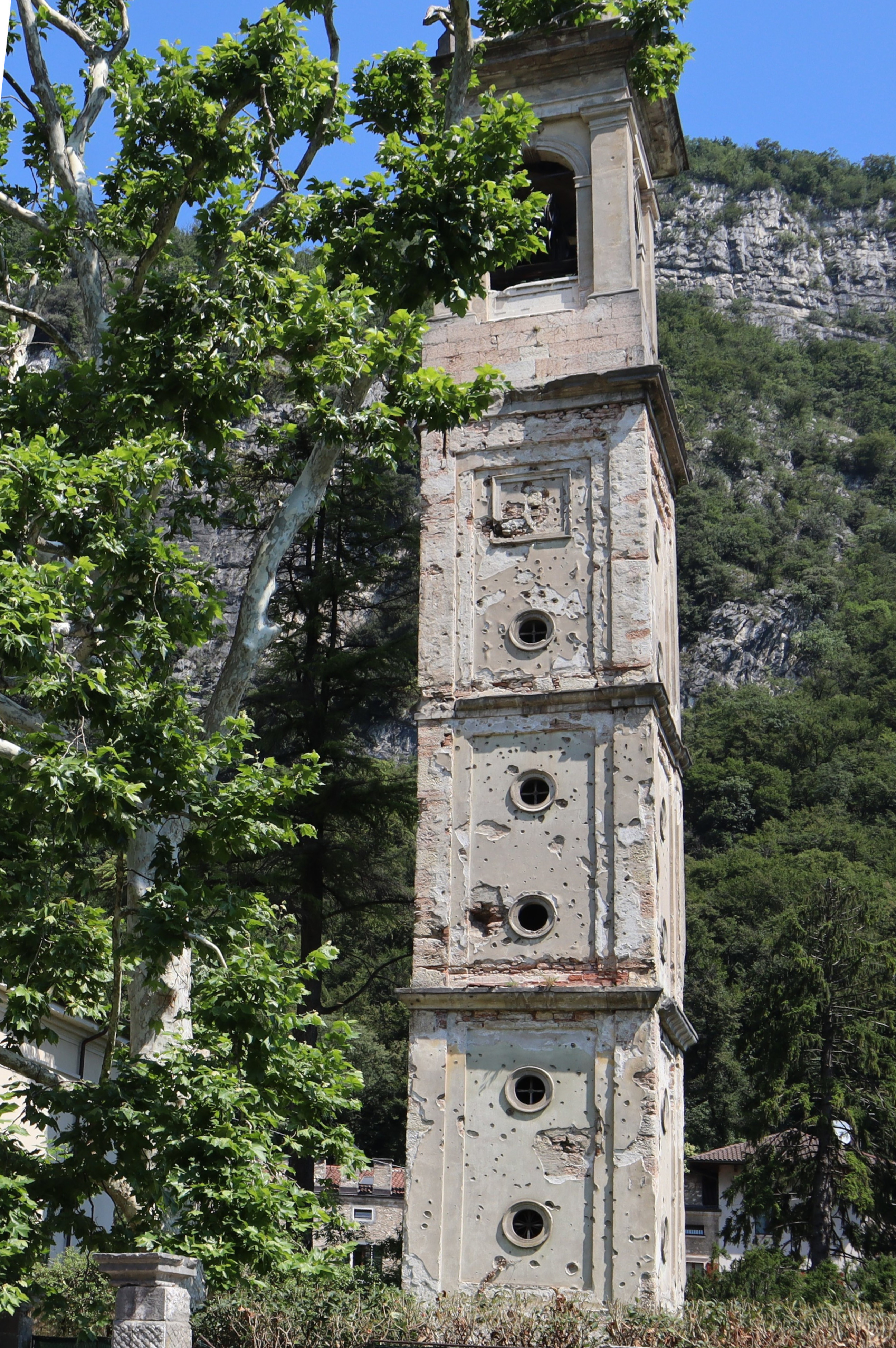 Chiesa del Nome di Maria, chiesa sussidiaria a Loppio, frazione di Mori in Trentino. Risale almeno al XVIII secolo. Torre campanaria.